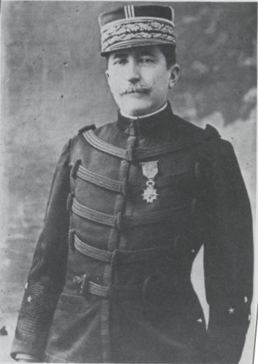 George-Marie Picquart